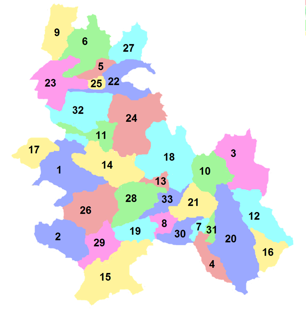 Mapa municipal de l'Anoia. 1 Argençola 2 Bellprat 3 El Bruc 4 Cabrera d'Anoia 5 Calaf 6 Calonge de Segarra 7 Capellades 8 Carme 9 Castellfollit de Riubregós 10 Castellolí 11 Copons 12 Els Hostalets de Pierola 13 Igualada 14 Jorba 15 La Llacuna 16 Masquefa 17 Montmaneu 18 Òdena 19 Orpí 20 Piera 21 La Pobla de Claramunt 22 Els Prats de Rei 23 Pujalt 24 Rubió 25 Sant Martí Sesgueioles 26 Sant Martí de Tous 27 Sant Pere Sallavinera 28 Santa Margarida de Montbui 29 Santa Maria de Miralles 30 La Torre de Claramunt 31 Vallbona d'Anoia 32 Veciana 33 Vilanova del Camí